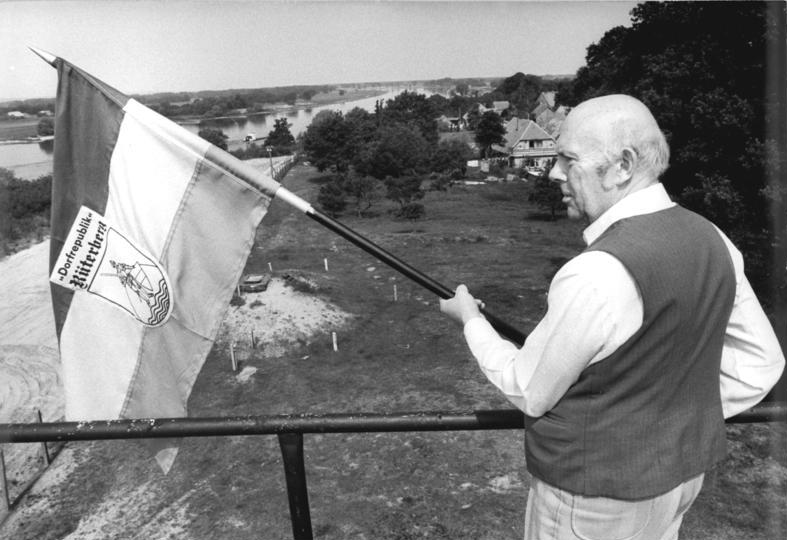 ADN-Pätzold-29.5.90-Bez. Schwerin: Als ewige Mahnung für die Misachtung von Staats- und Bürgerrechten wollen die Einwohner der kleinen Elbgemeinde Rüterberg im Kreis Ludwigslust den Status ihrer am 8.11.1989 proklamierten "Dorfrepublik" beibehalten. 22 Jahre lang lebten sie in nahezu völliger Isolation, eingesperrt zwischen zwei Stacheldrahtzäunen: linker Hand zur BRD, rechter Hand zur DDR. Zwischen 5.00 Uhr und 23.00 Uhr konnten sie ihr Dorf gegen Vorlage eines Passierscheines verlassen und betreten, nachts wurden sie unter Verschlus gehalten. Hans Rasenberger, geistiger Vater der dritten deutschen Republik, mit der "Staatsflagge".